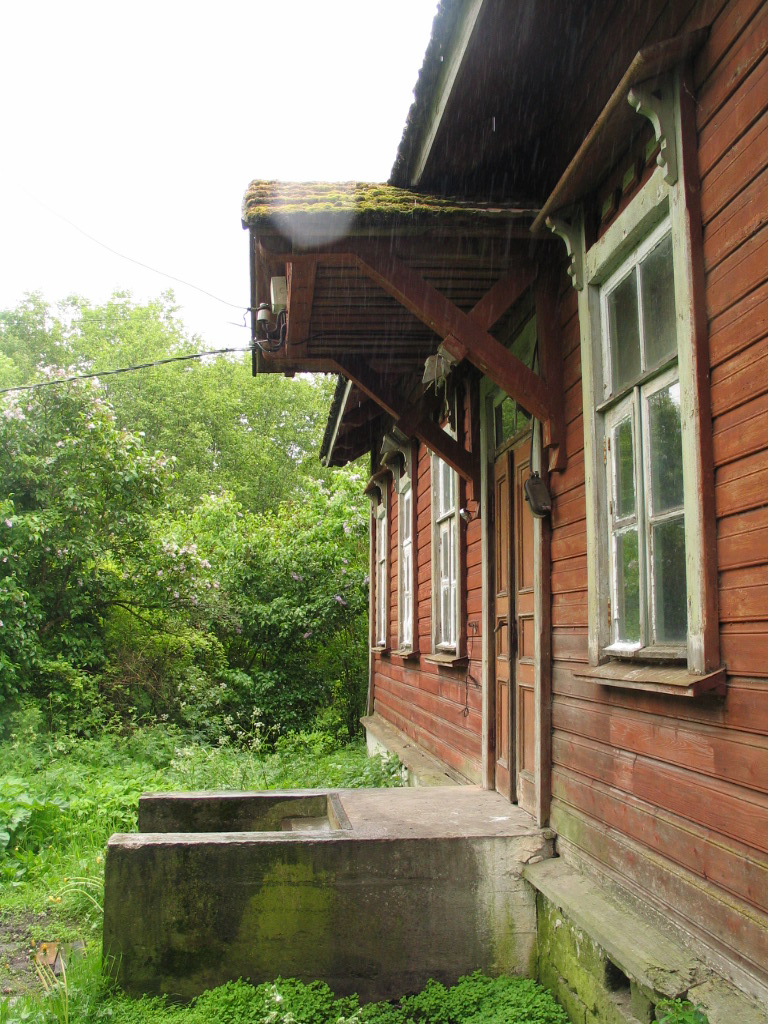 Jaakna jaamahoone põhjafassaad